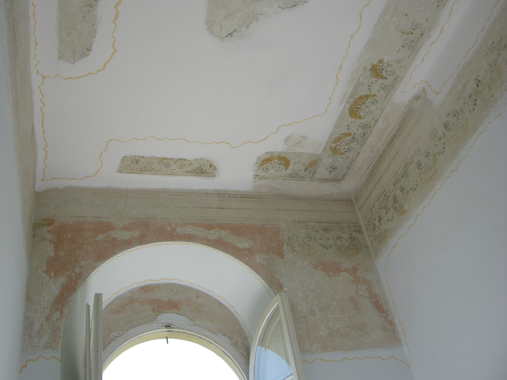 Hotel italia, marina di massa, tracce di affreschi